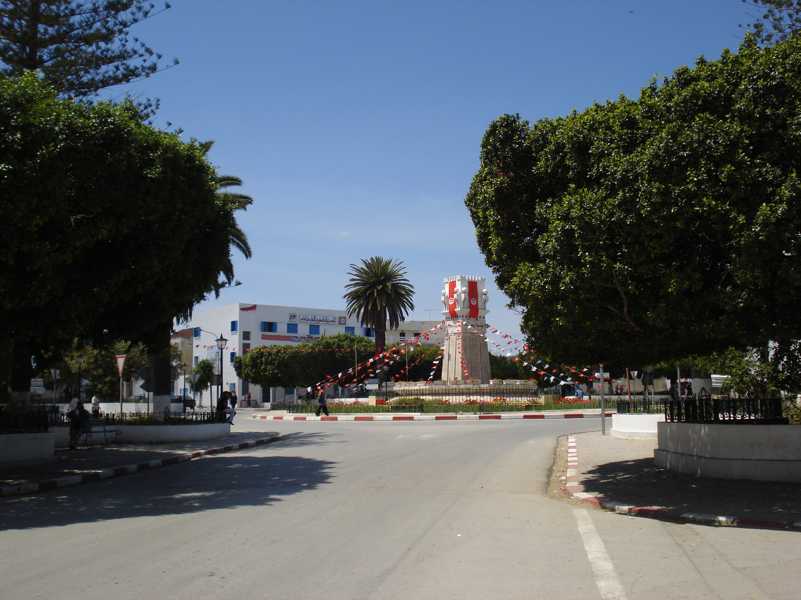 Centre-ville de Menzel Bourguiba, Tunisie